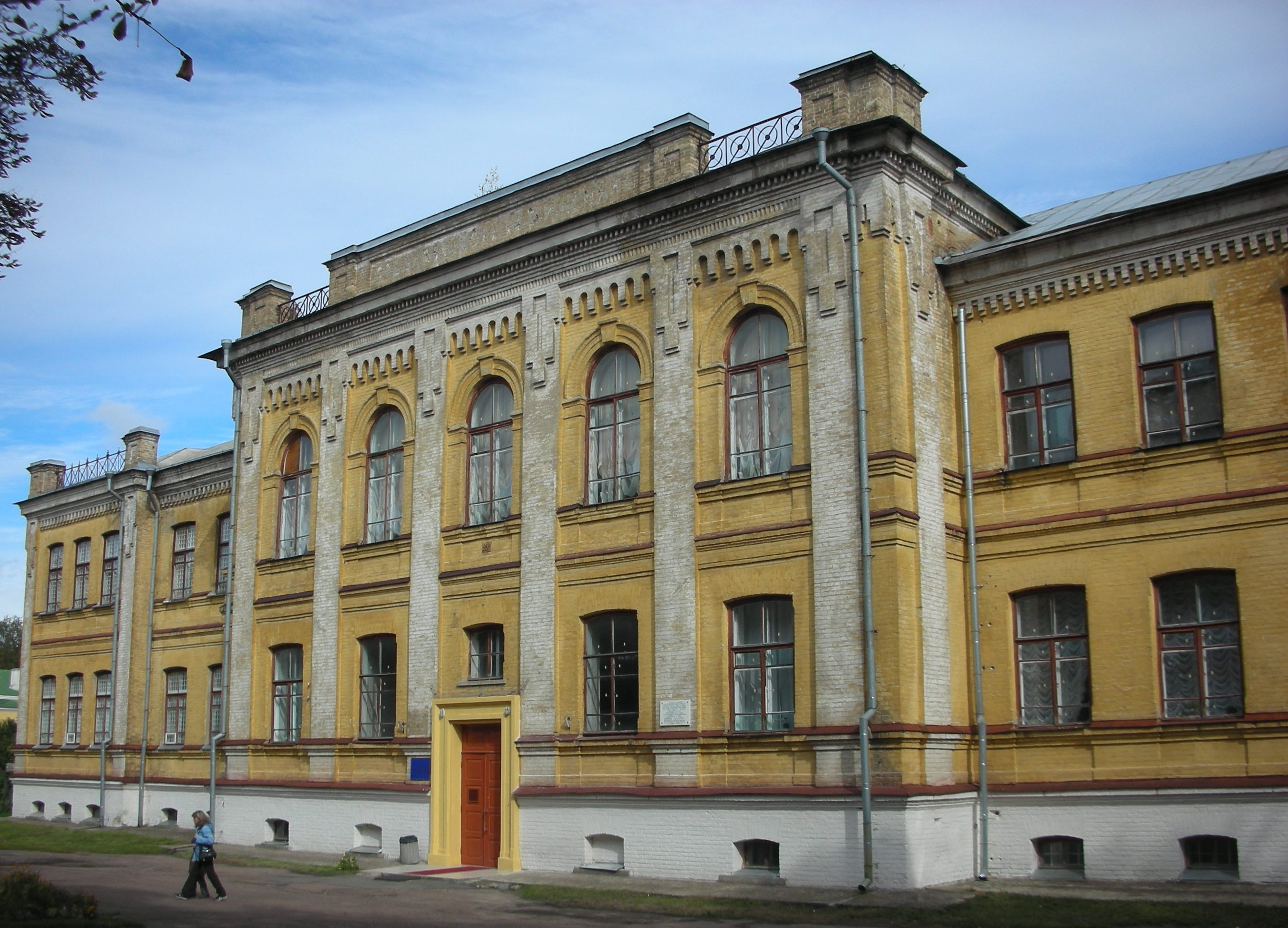 Чернігівська жіноча гімназія, Чернігів, вул. Горького, 6